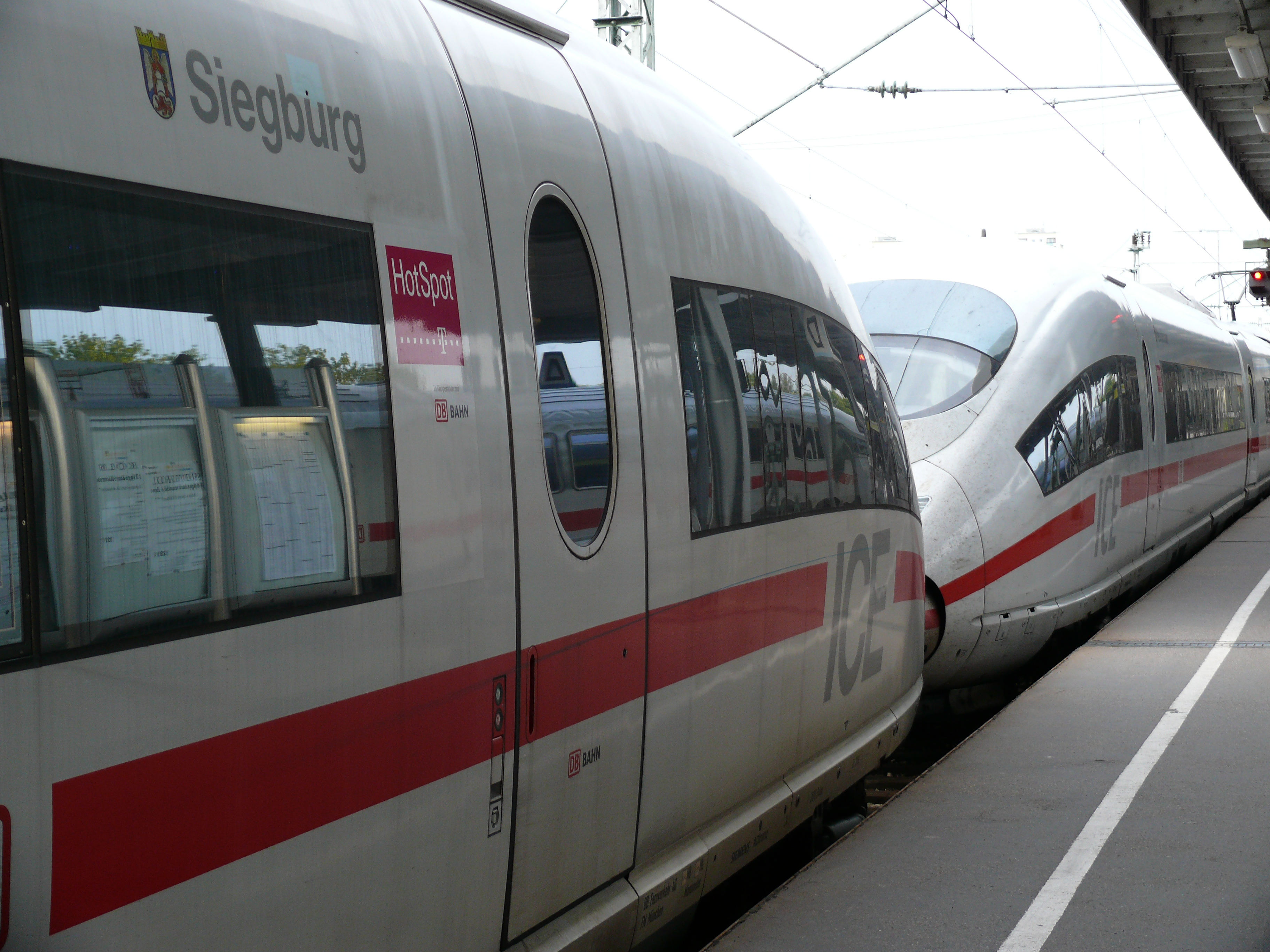 ICE3 der auf Siegburg getauft wurde.